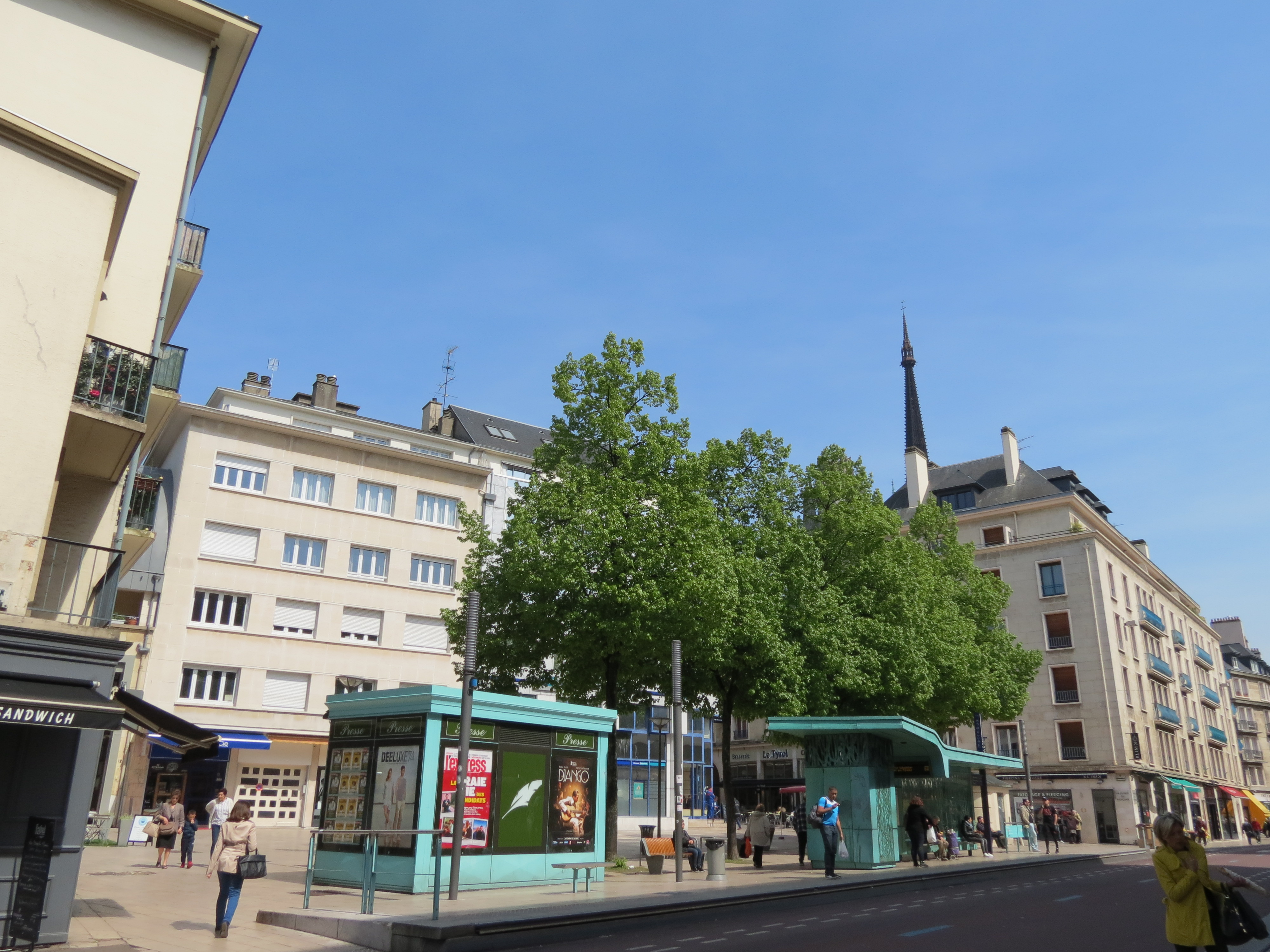 Place Jacques Lelieur.